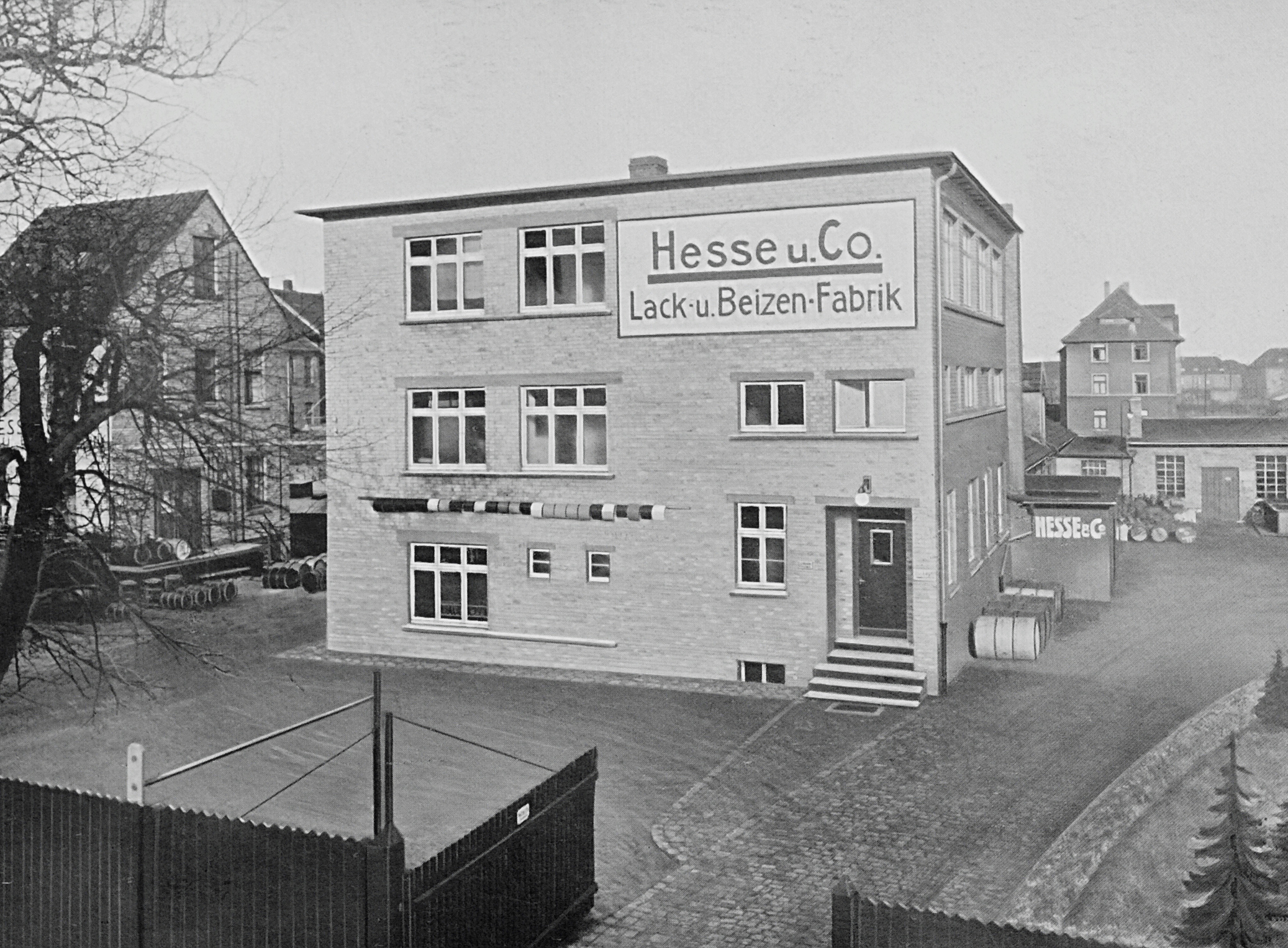 Aufnahme der Firma Hesse aus dem Jahre 1930